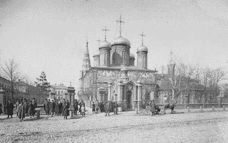 Богоявленская церковь в Казани. Фото конца XIX века.